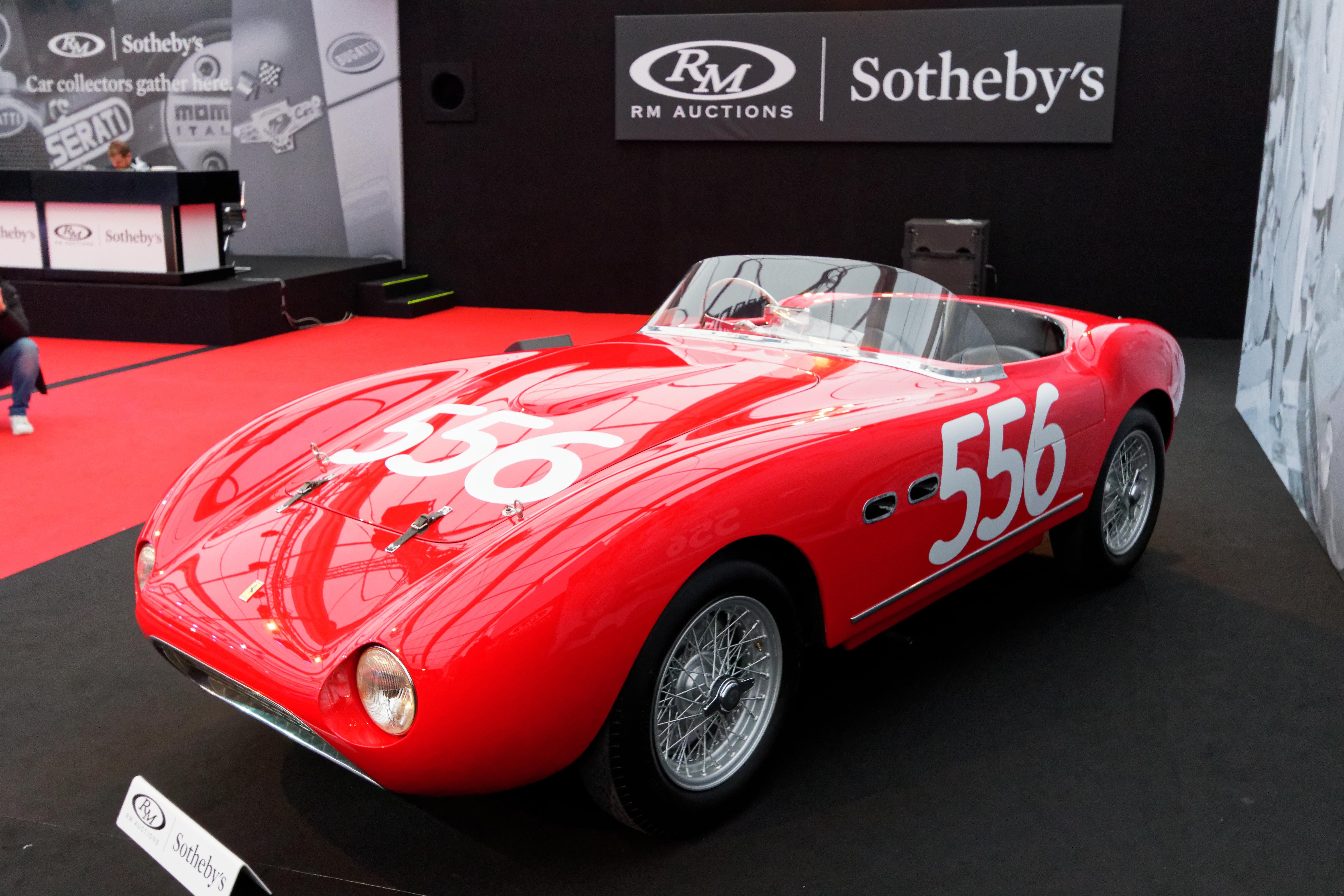 Un véhicule exposé lors de la vente RM Sotheby’s 2018 aux Invalides à Paris.